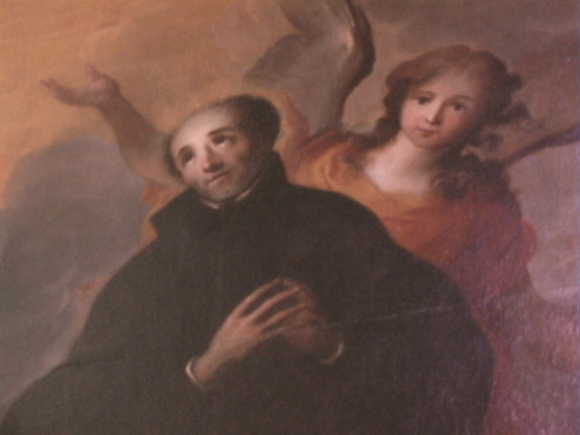 Saint François Régis, tableau anonyme (XVIIe) conservé à l'église Saint-Jean-de-Montierneuf de Poitiers